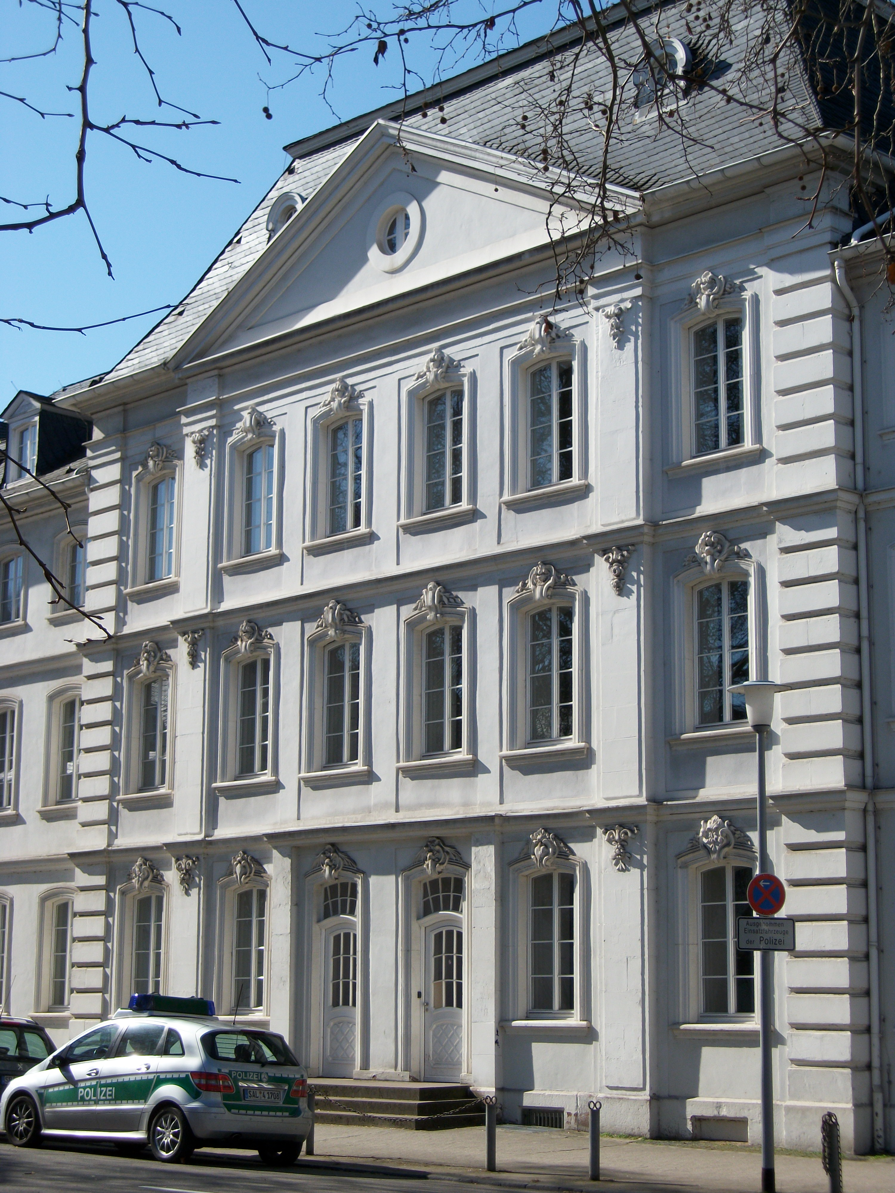 Hochschule der Bildenden Künste Saar